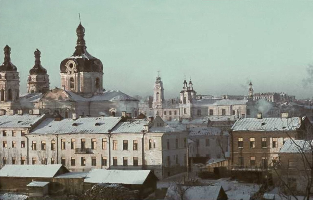 Беларуская (тарашкевіца): Віцебск (Viciebsk), вуліца Задунаўская (vulica Zadunaŭskaja). Касьцёл Сьвятога Язэпа і калегіюм езуітаў па маскоўскай перабудове